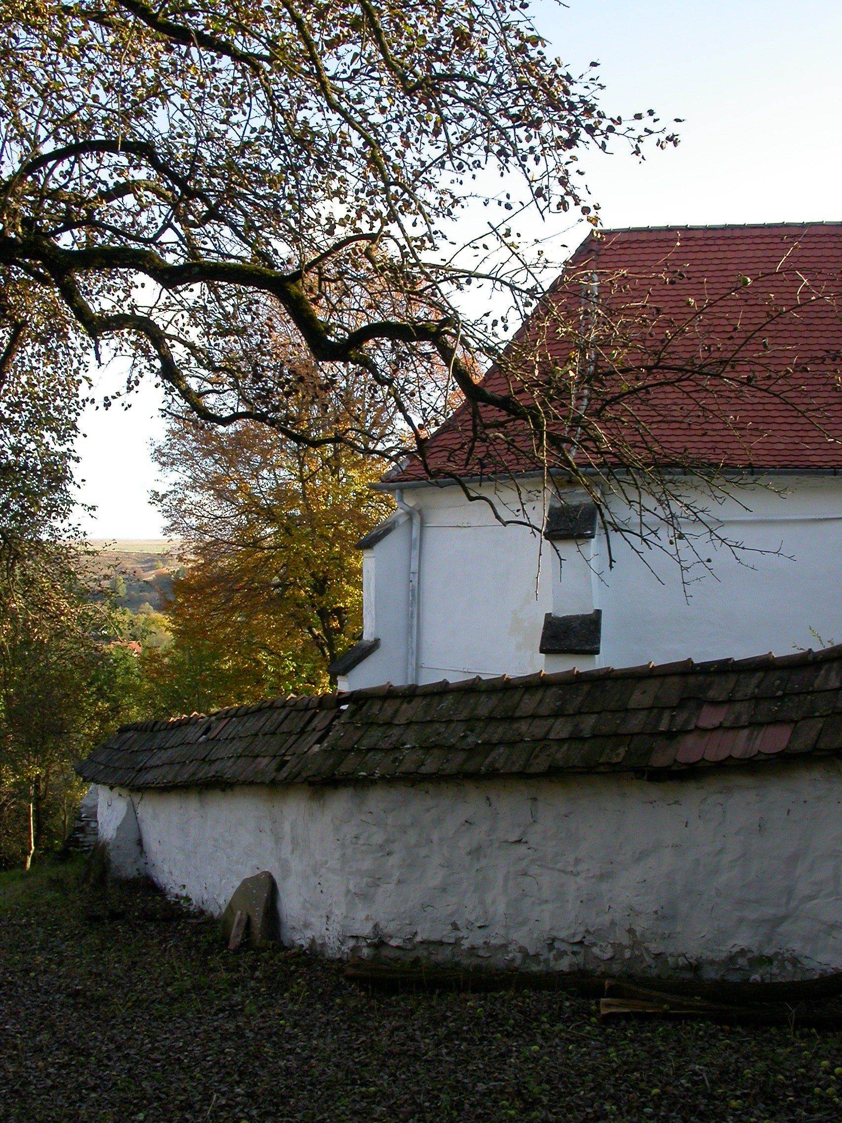 Ansamblul bisericii unitariene, sec. XV - XIX